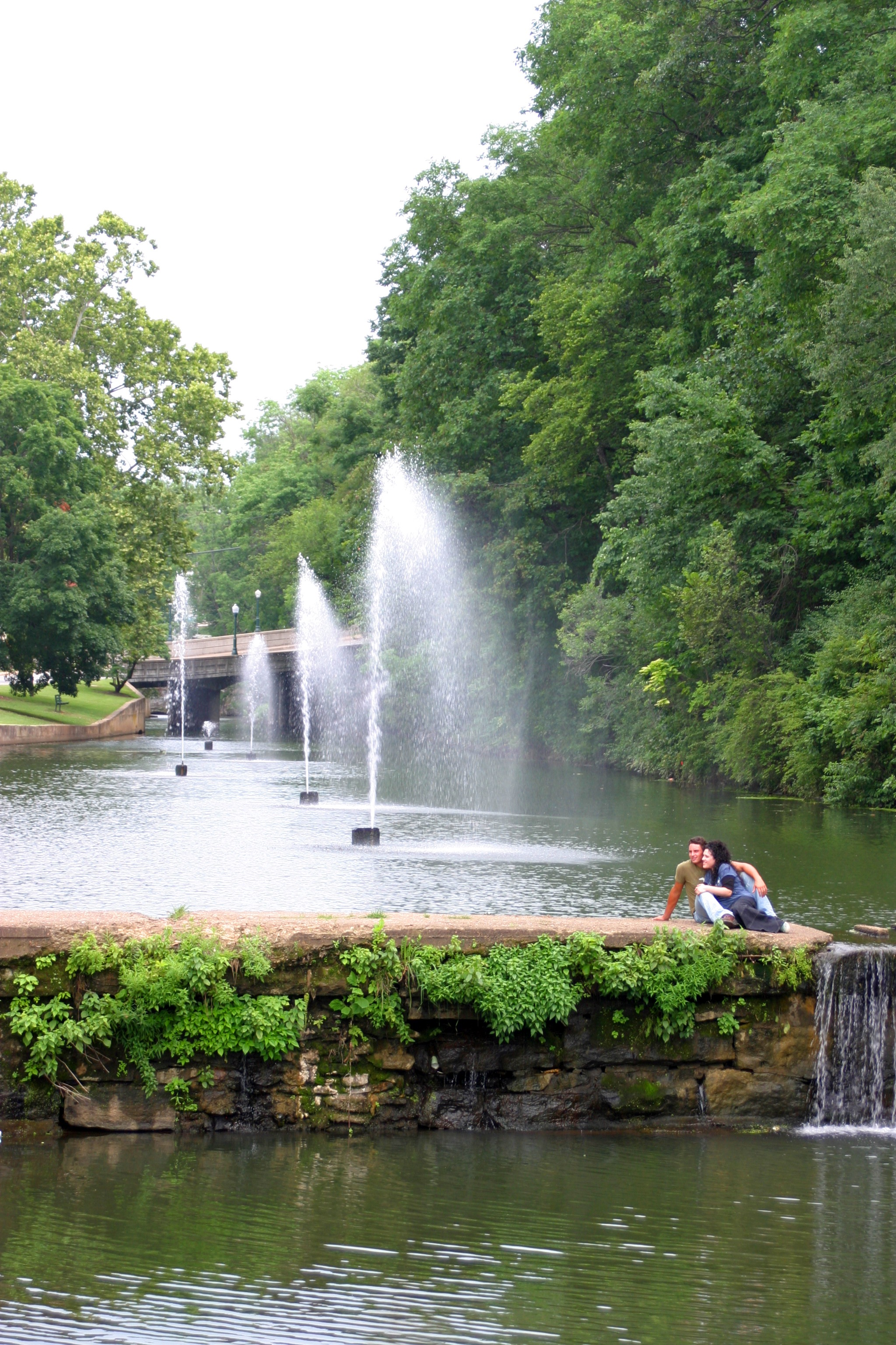 Fountains in Siloam Springs, Arkansas